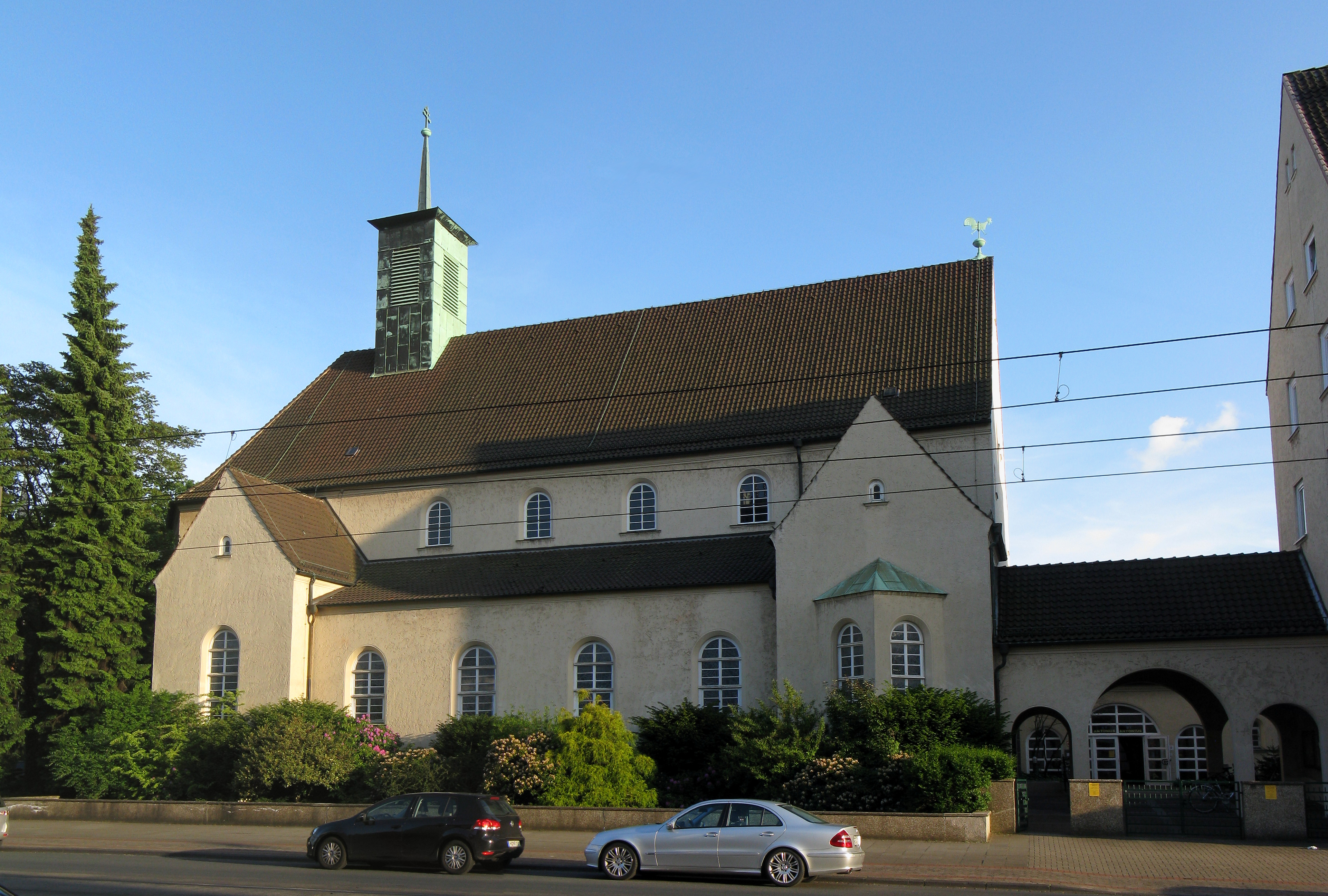 Hannover: kath. Kirche St. Antonius in Kleefeld